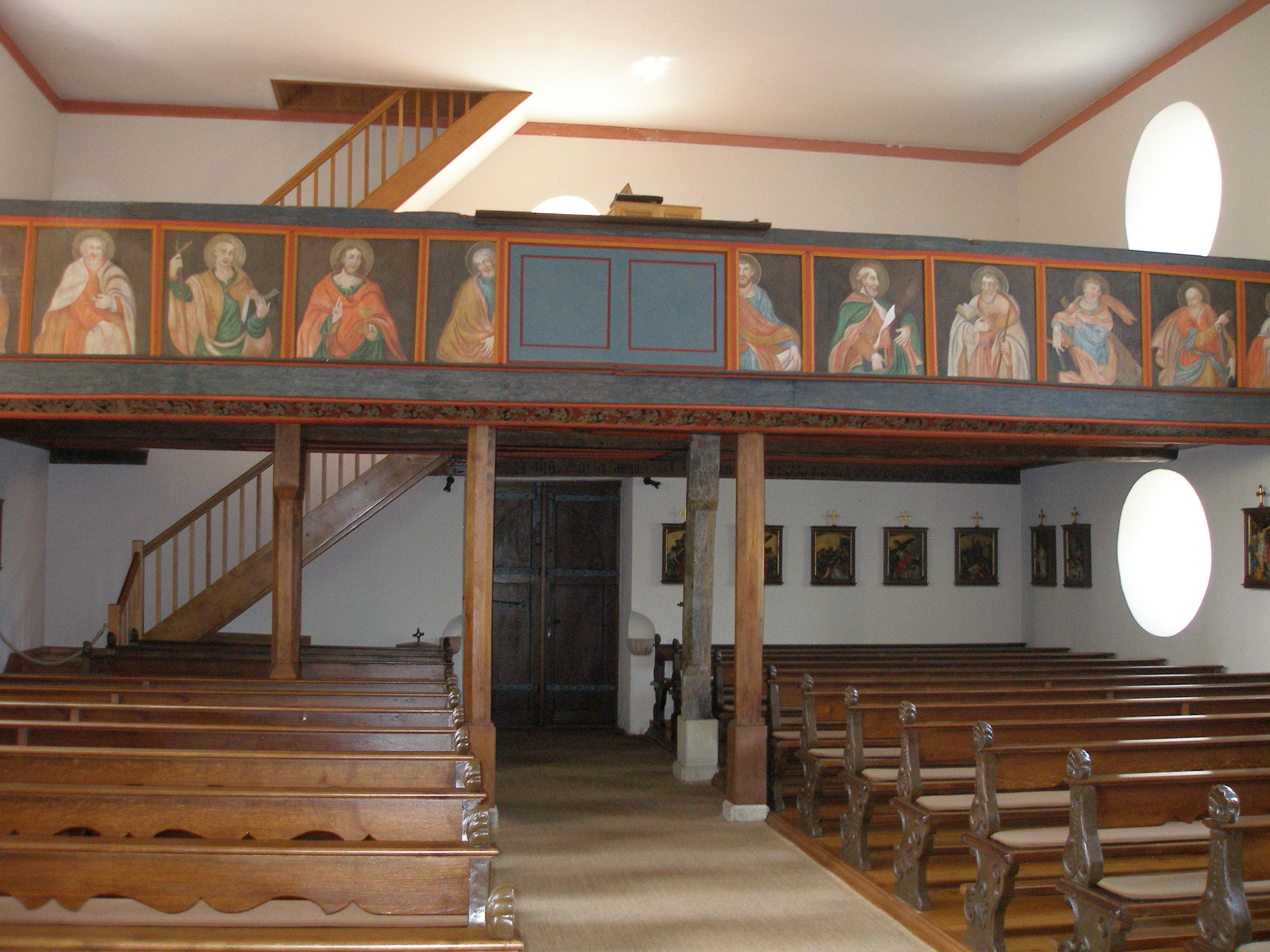 Straßdorf Alte Kirche